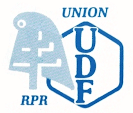 Logo de l'union RPR-UDF pour les élections législatives françaises de 1986.